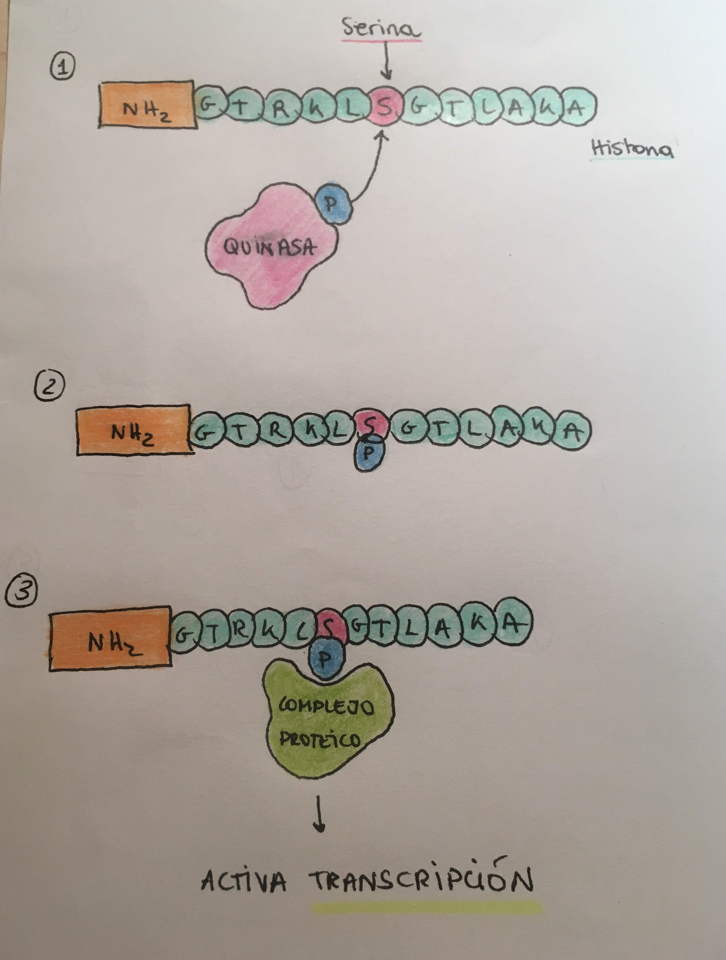 En este dibujo se representa el proceso de fosforilación de una histona, con la acción de una quinasa (que podría ser MSK1) y como esta proteína es reconocida por un complejo que activa la transcripción.